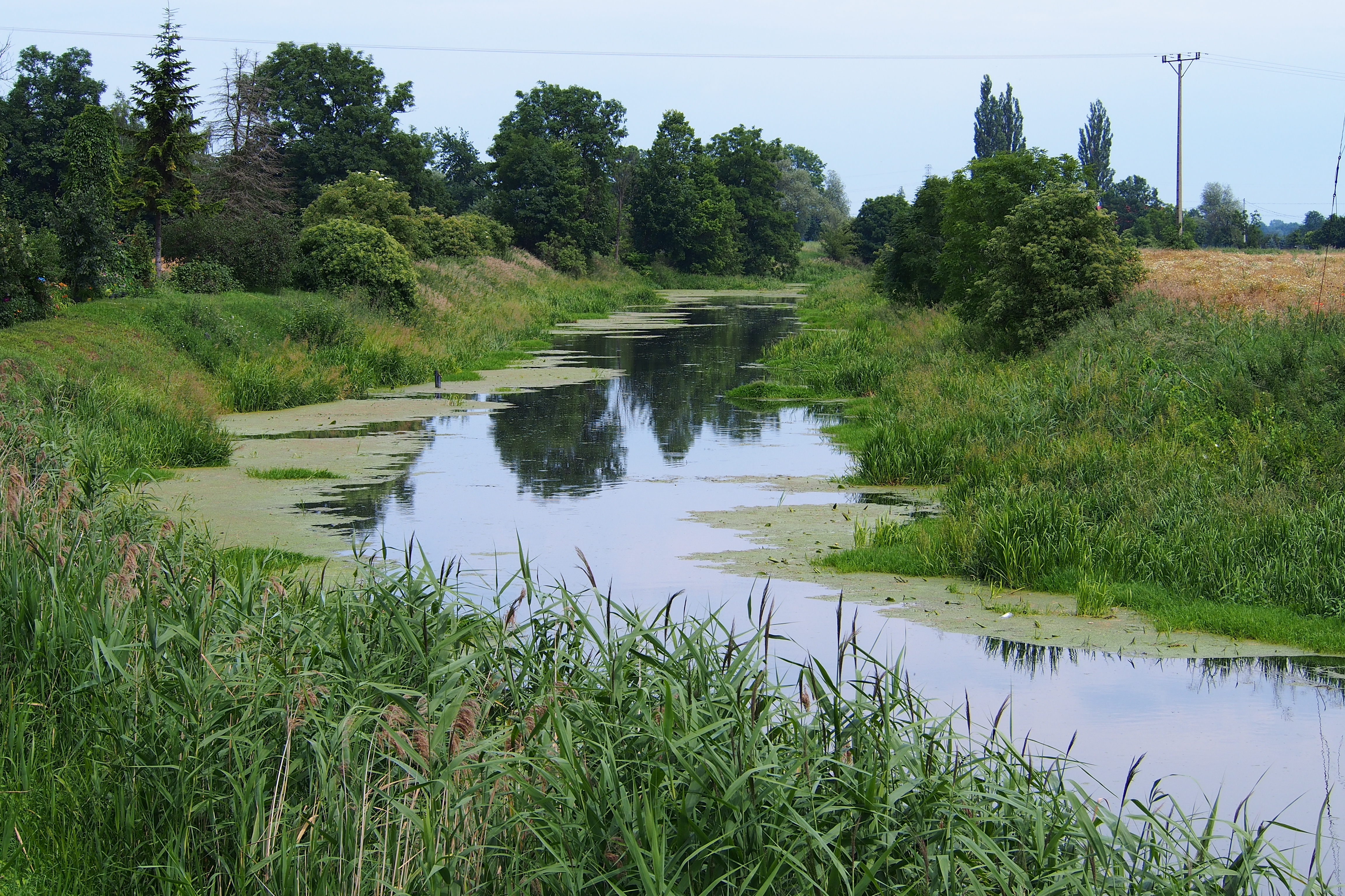 Grabiny-Zameczek - rzeka Motława